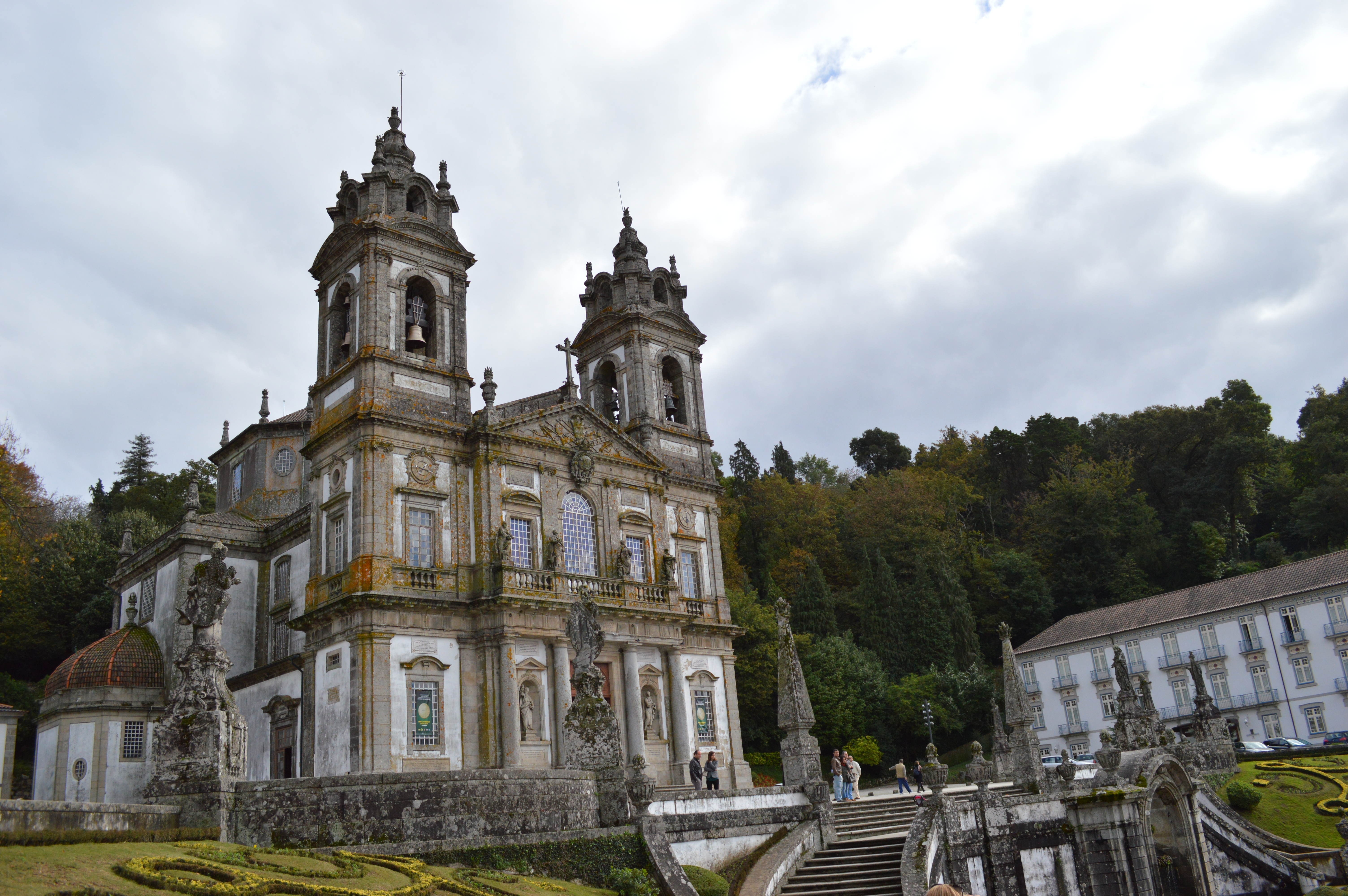 Bom Jesus